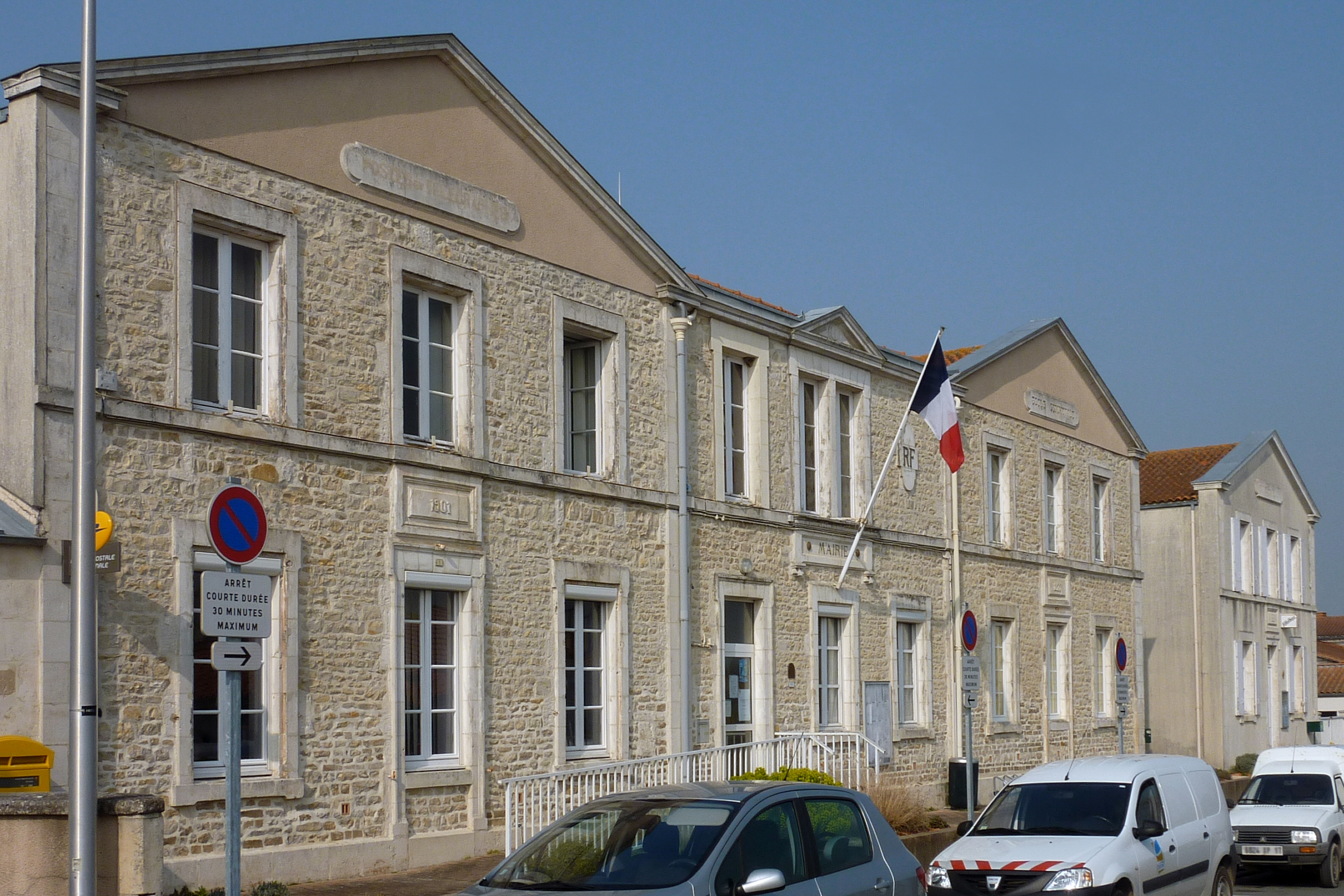 Mairie Charron Charente-Maritime France